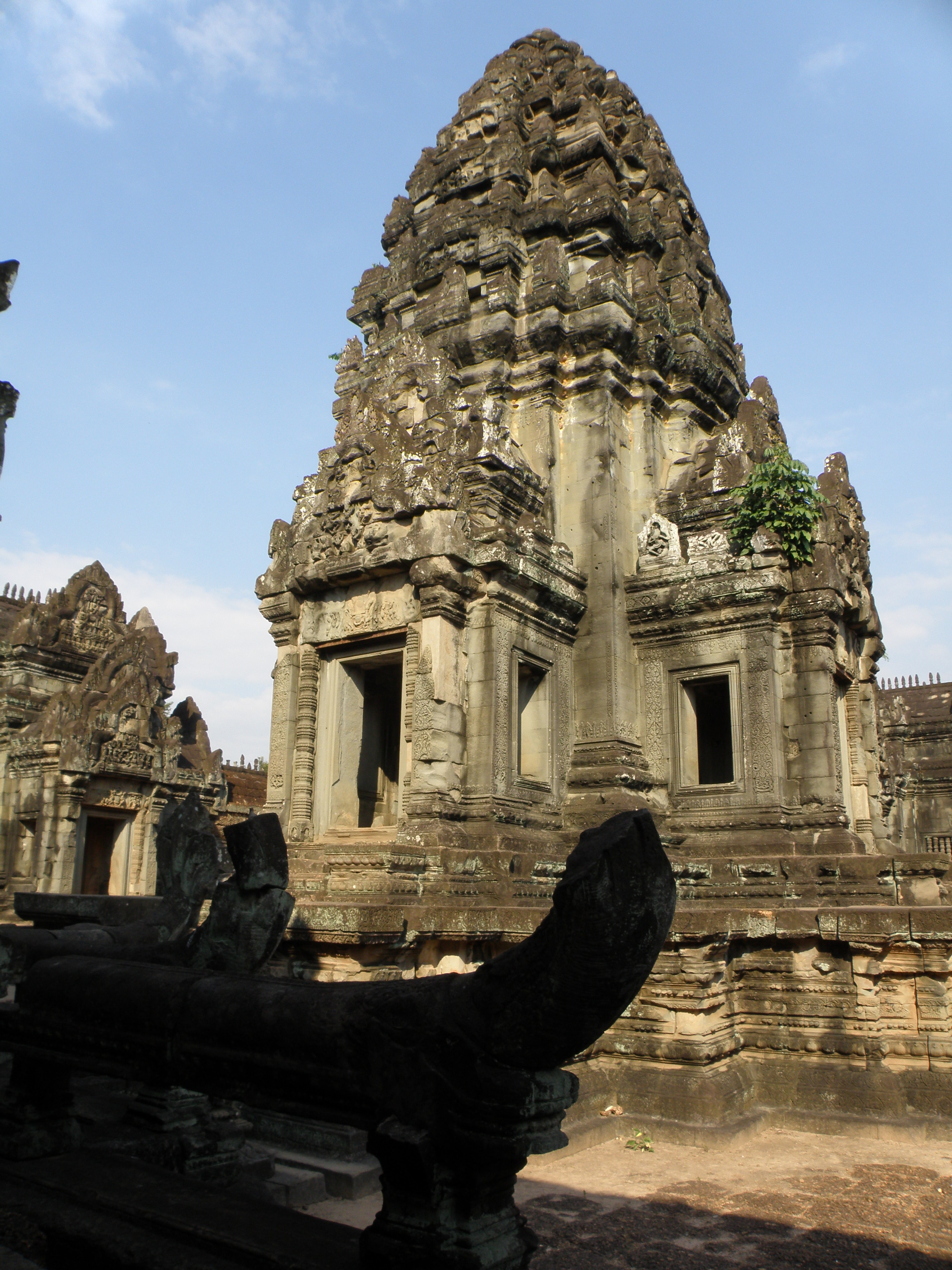 Cambodge - Banteay Samré - Tour centrale